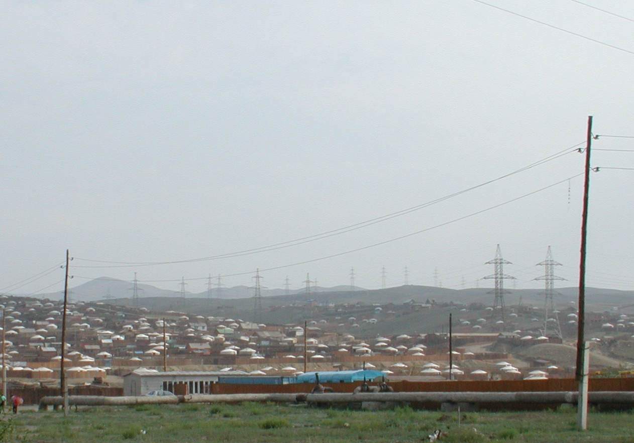 Jurten am Stadtrand von Ulan Bator fotografiert am 16.Juli 2003